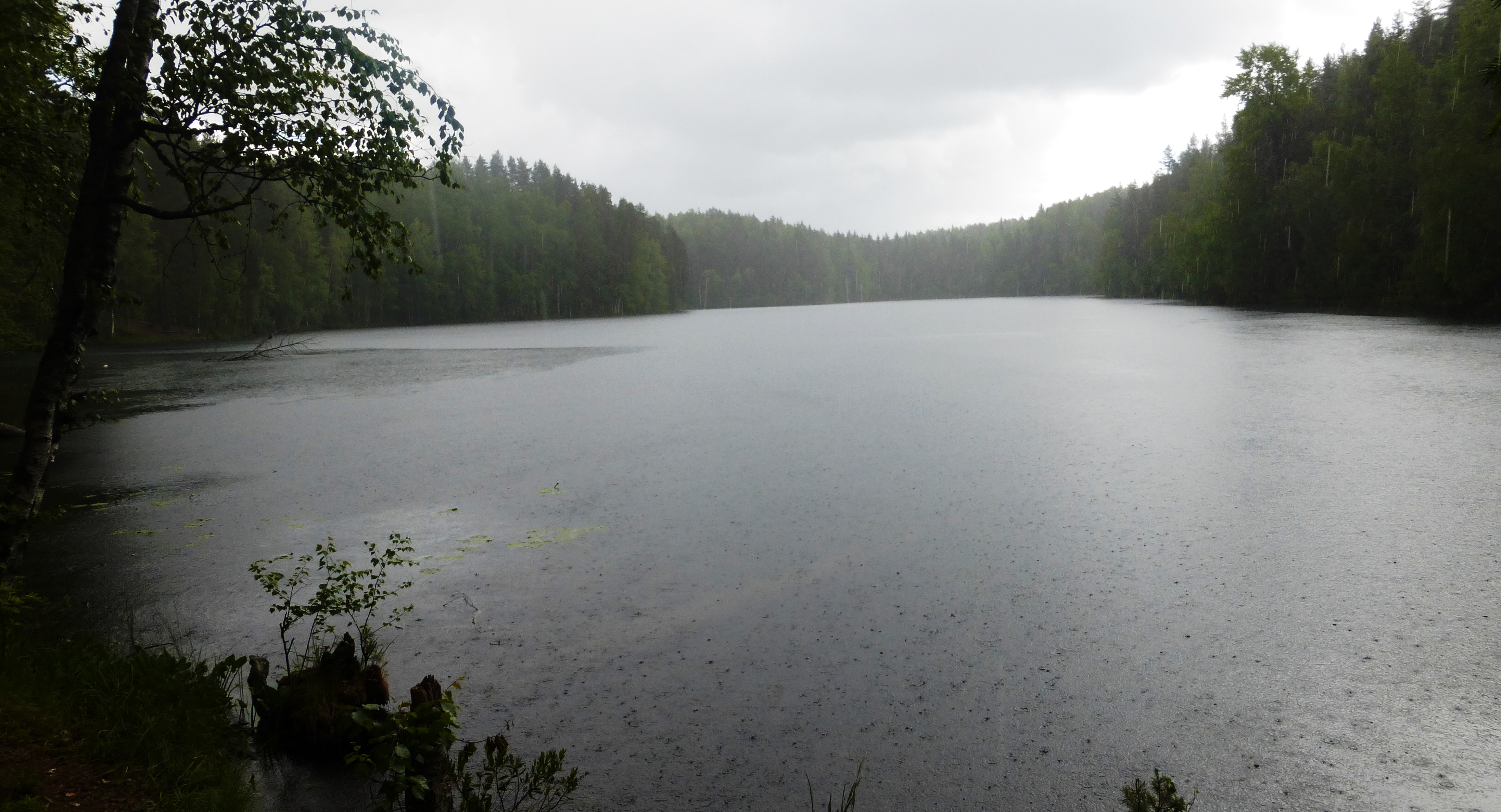 Лесное озеро (Светлая ламба) в Пряжинском районе Республики Карелия. Вблизи деревни Салменица.